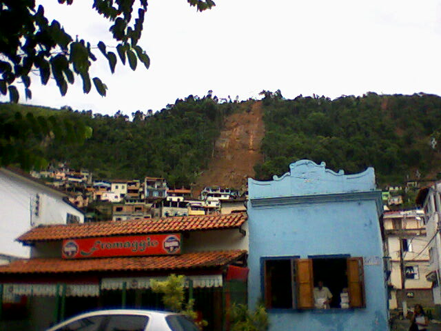 Morro da Carioca, dias após os desmoronamentos de terra que aconteceram em Angra dos Reis